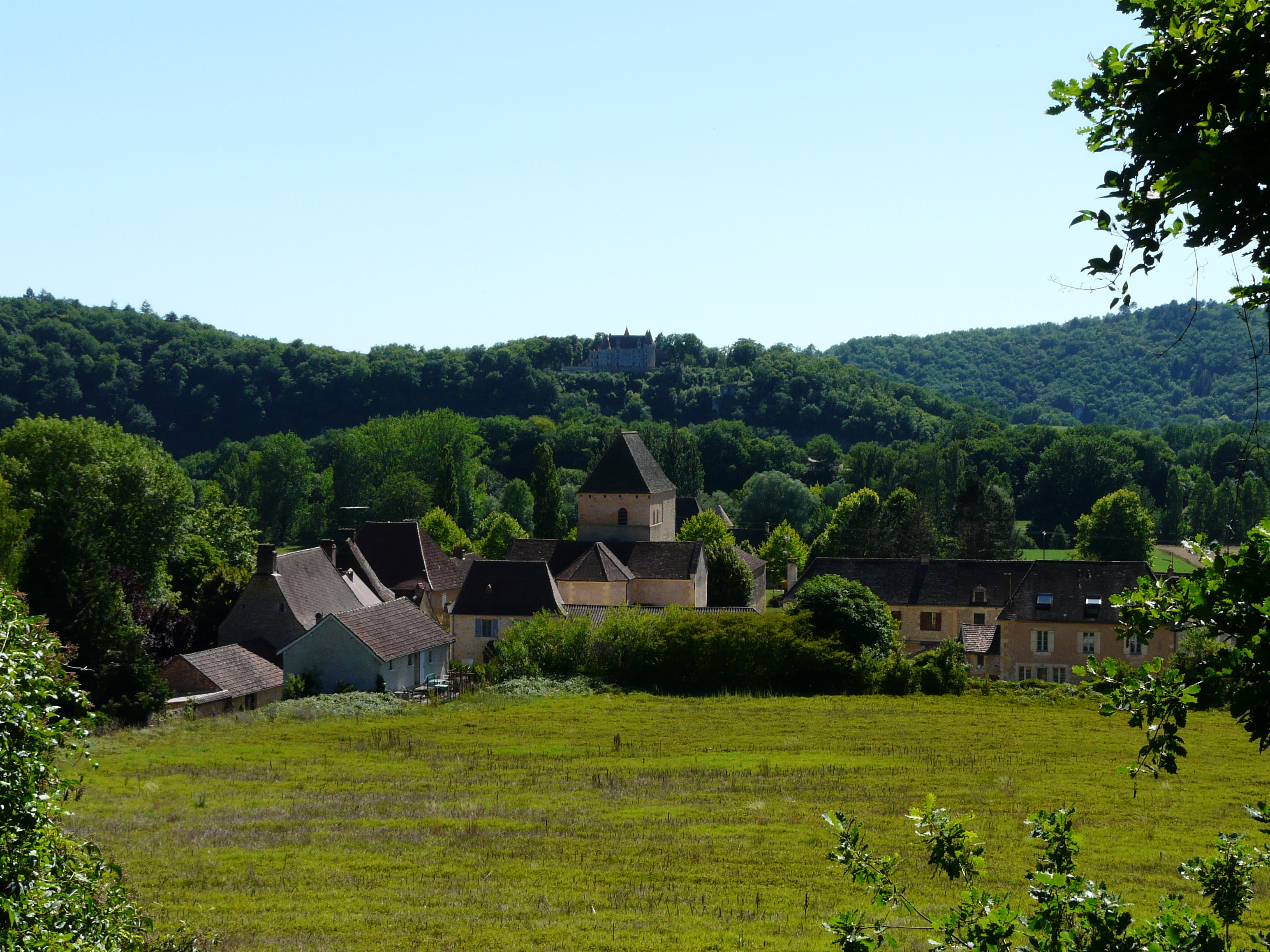 Le village de Tursac, Dordogne, France. Au fond, le château de Marzac.